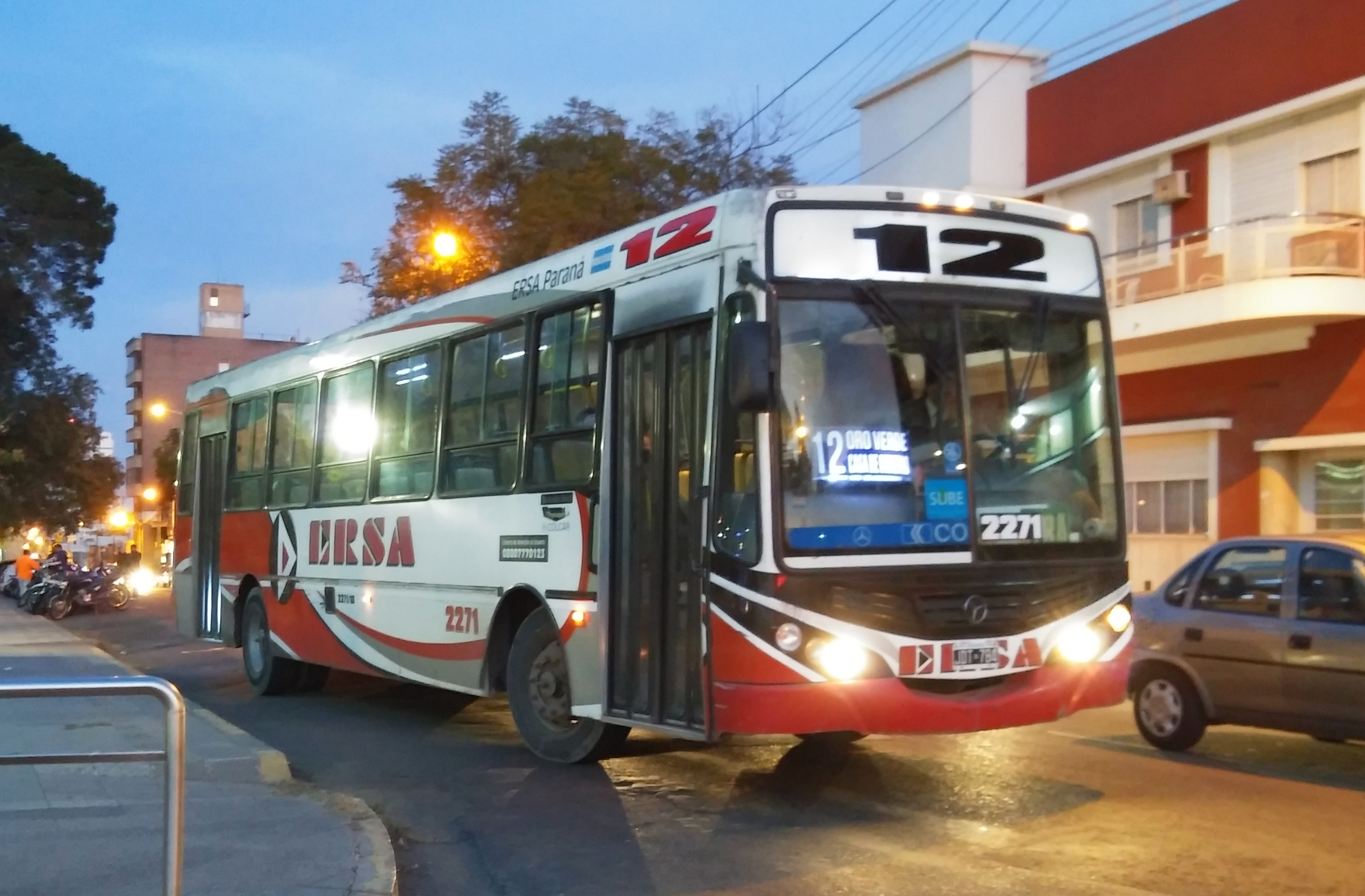 ERSA Urbano Paraná Línea 12 Interno 2271